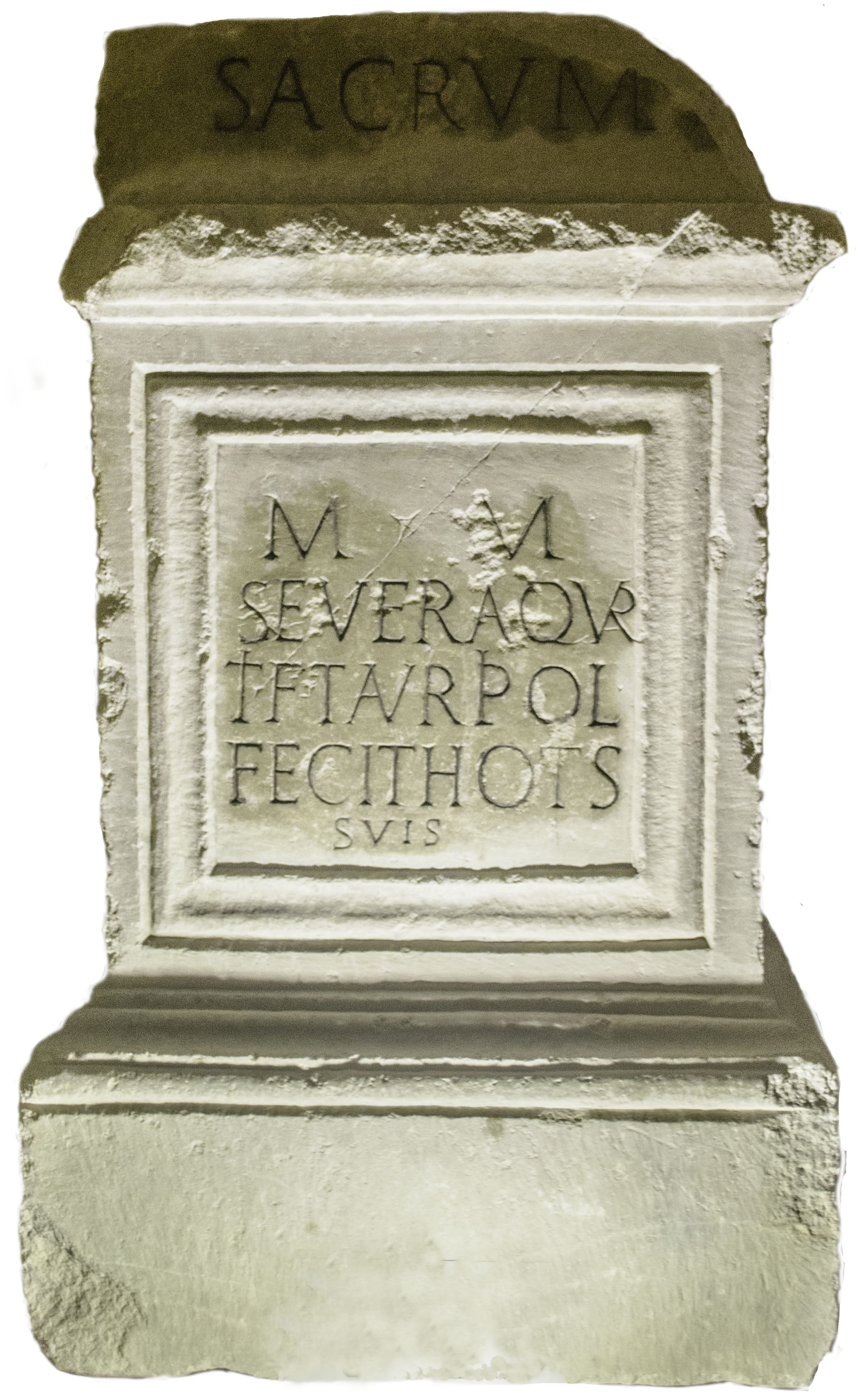 Autel taurobolique de Severa. Musée Eugène-Camoreyt de Lectoure, Gers, France.